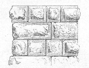 Pfeilermauerwerk aus Buckelquadern (Randschlag schraffiert). Rom, Aqua marcia, Aquädukt, 144-140 vor Christus.